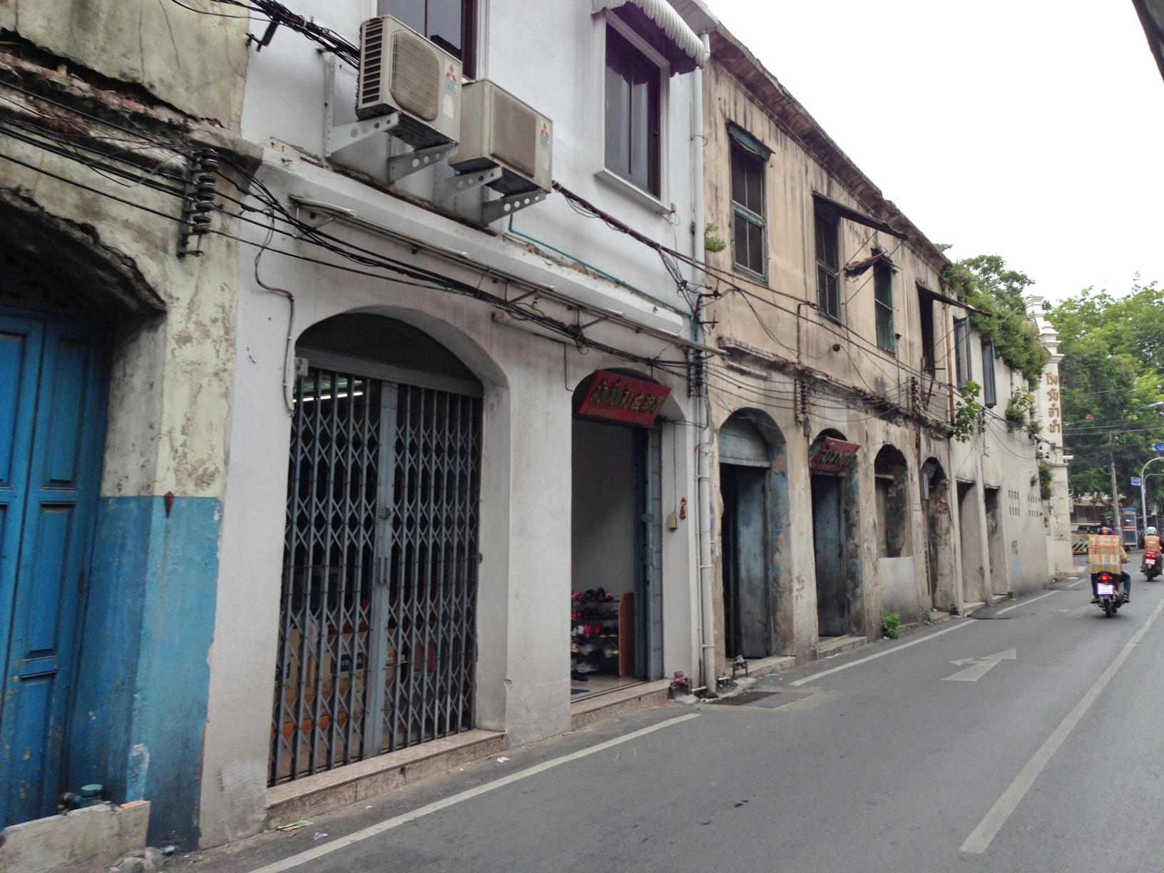 Thanon Bamrung Muang rd, Samran rat, Phra nakhon, Thailand